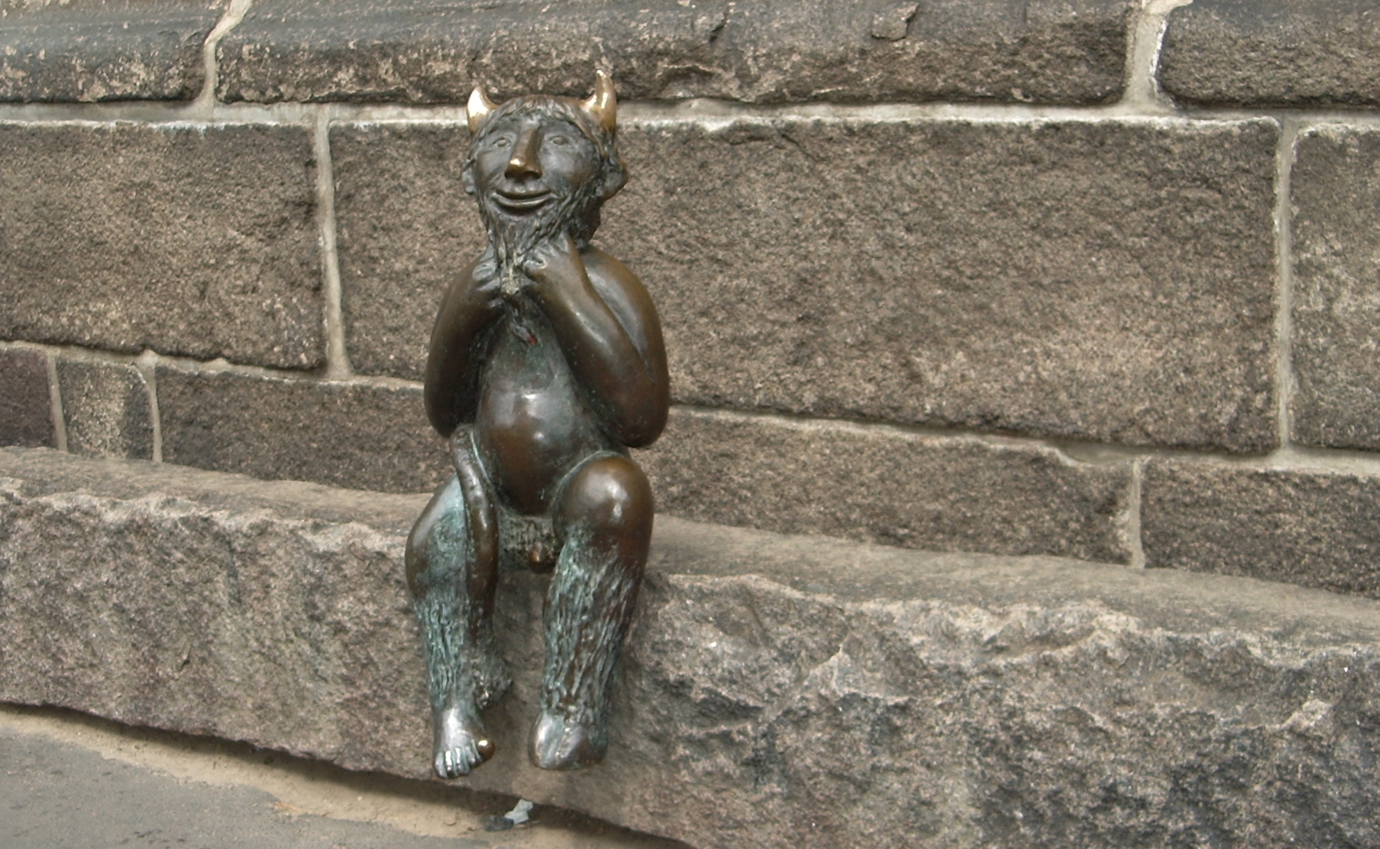 Ein Besuchermagnet an der Marienkirche in Lübeck. Beachtenswert sind die Abriebstellen an der Skulptur von Rolf Goerler aus dem Jahre 1999.